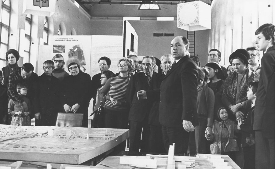 Открытие музея по проблемам истории и перспективам развития архитектуры Урала, экскурсию ведет Н.С. Алферов